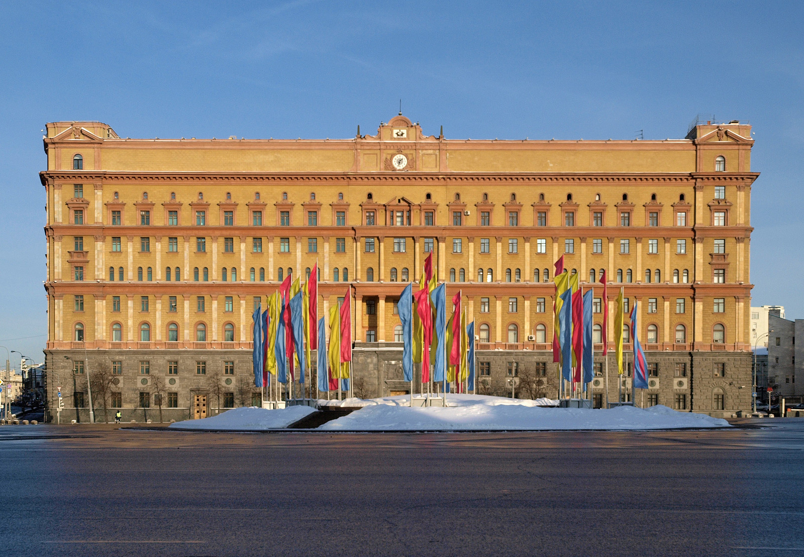 Москва. Улица Большие Лубянка.